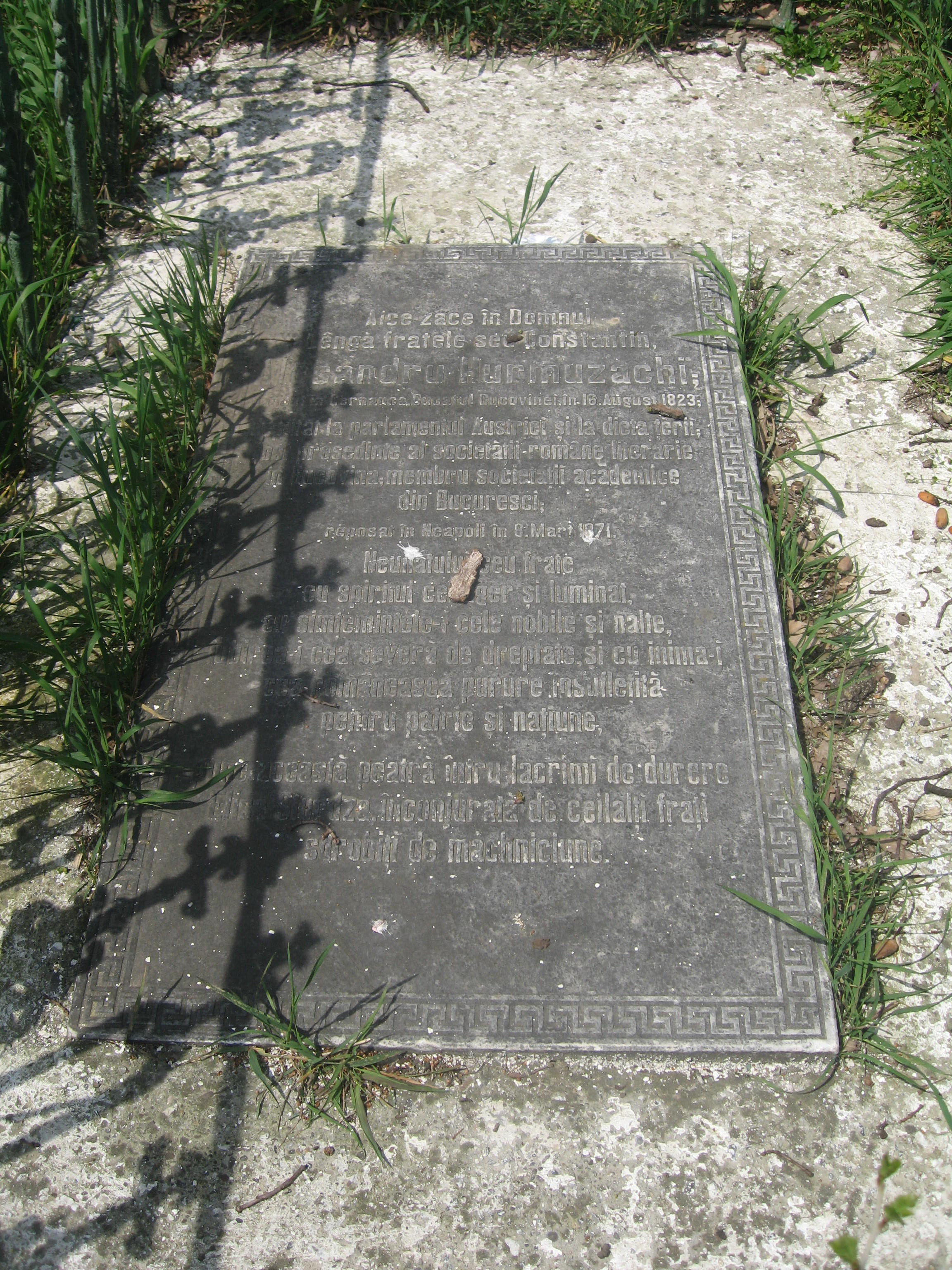 Biserica Pogorarea Sf. Duh din Dulcesti